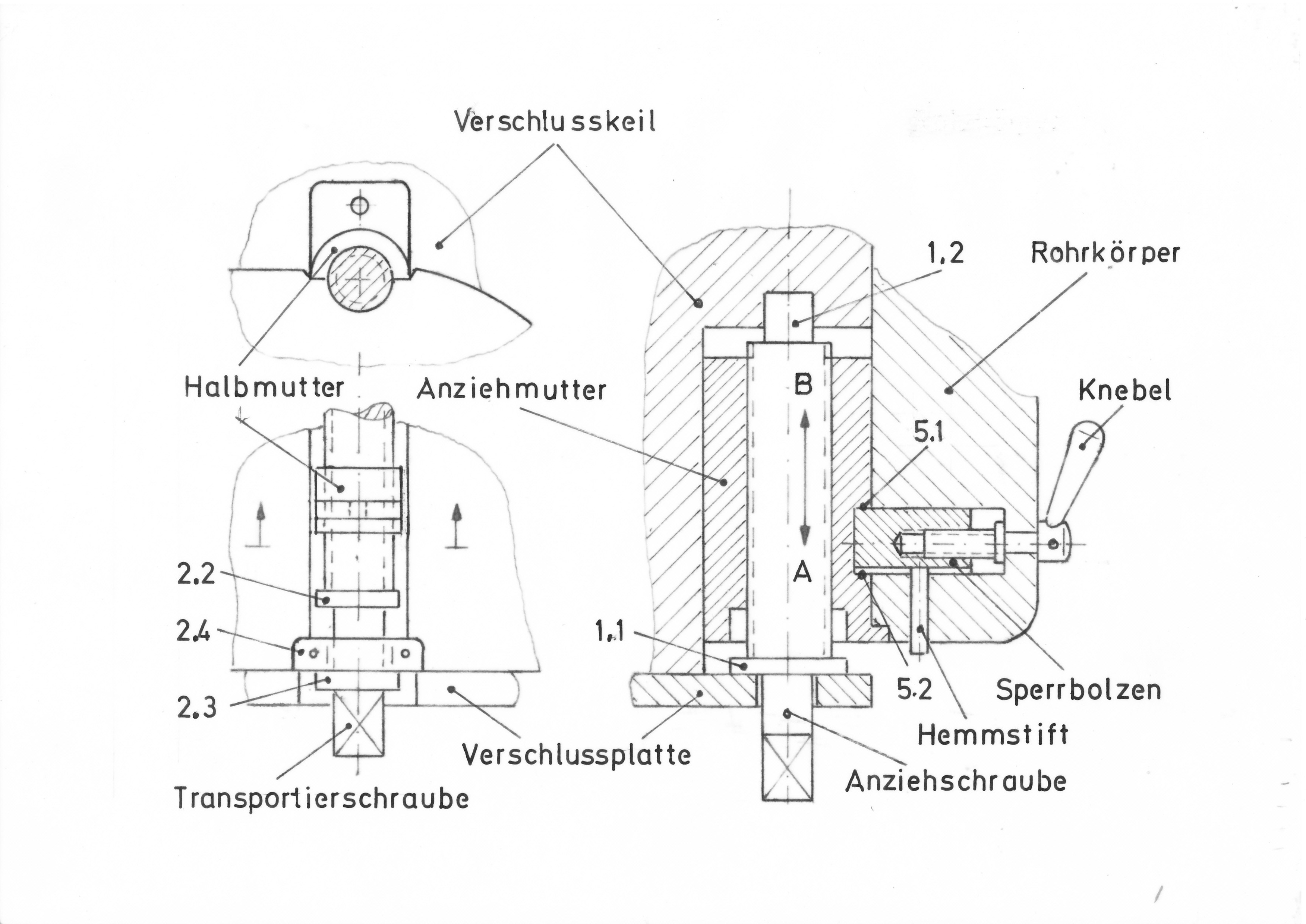 Krupp'scher Rundkeil C 1866. Das Bild wurde gestaltet nach: W.Wilhelmi: Die 8-zöllige gezogene (Krupp'sche) Rücklade-Kanone im Dienste der k.k. Kriegsmarine. In: J. Ziegler: Archiv für Seewesen Band 4. Wien 1868